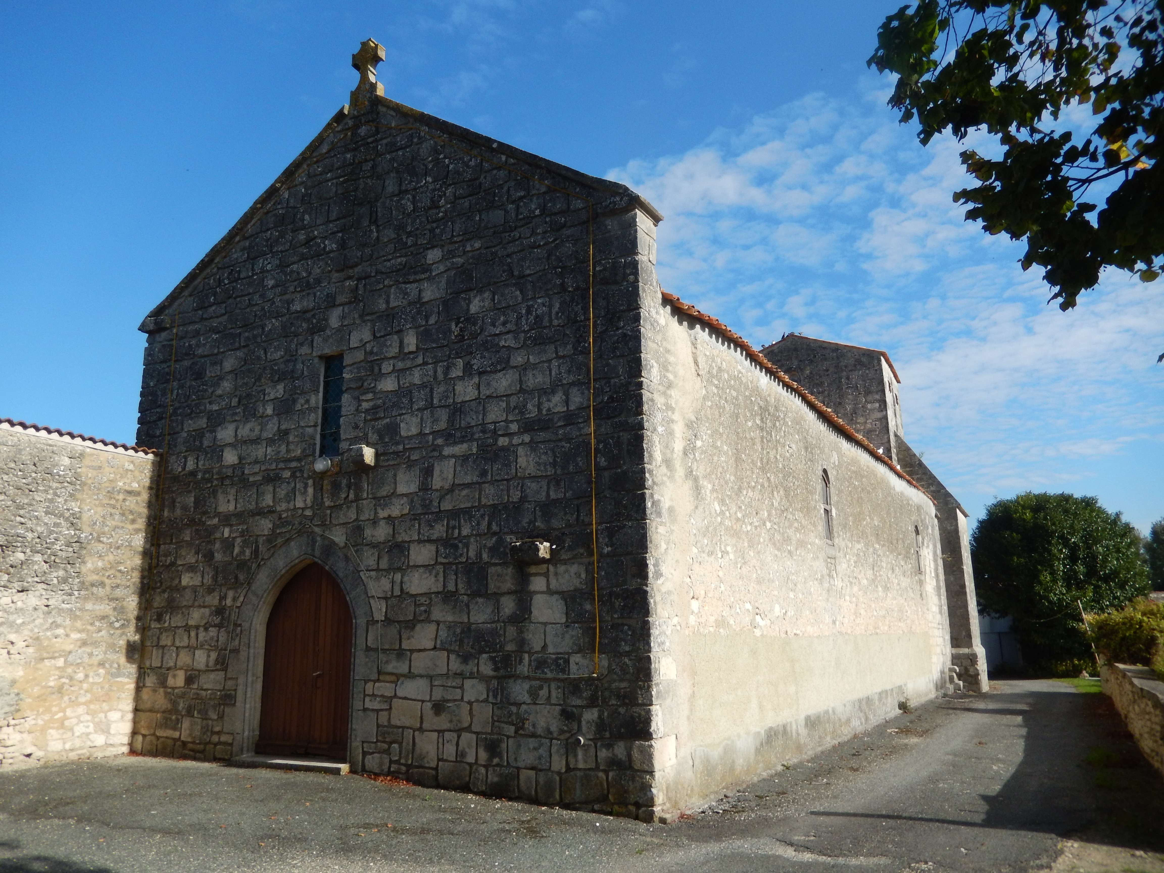 Saint-Pierre-de-Juillers, Charente-Maritime, France. • La petite église Saint-Pierre-ès-Liens, dans le village de Saint-Pierre-de-Juillers.